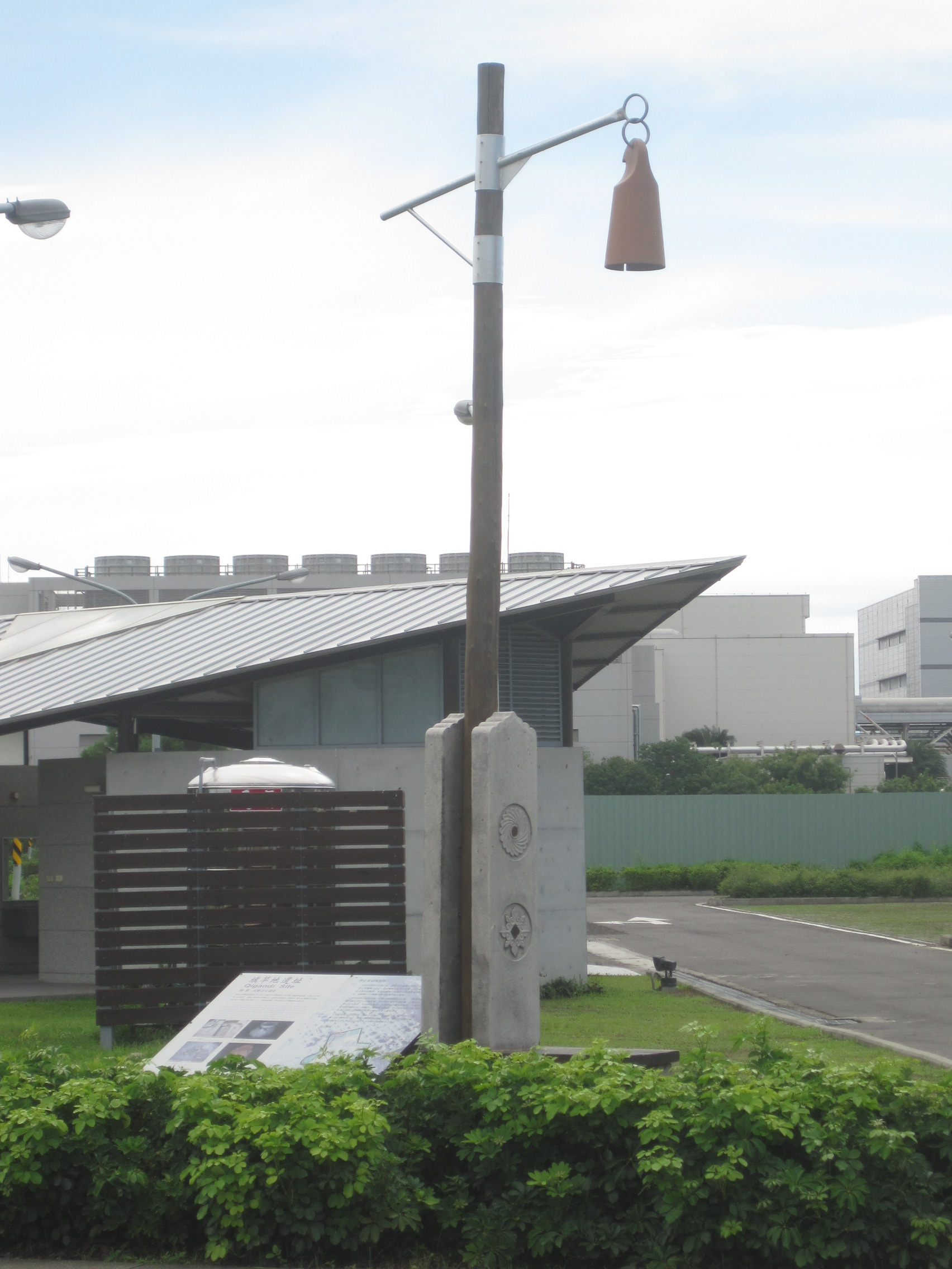 旗竿地遺址意象